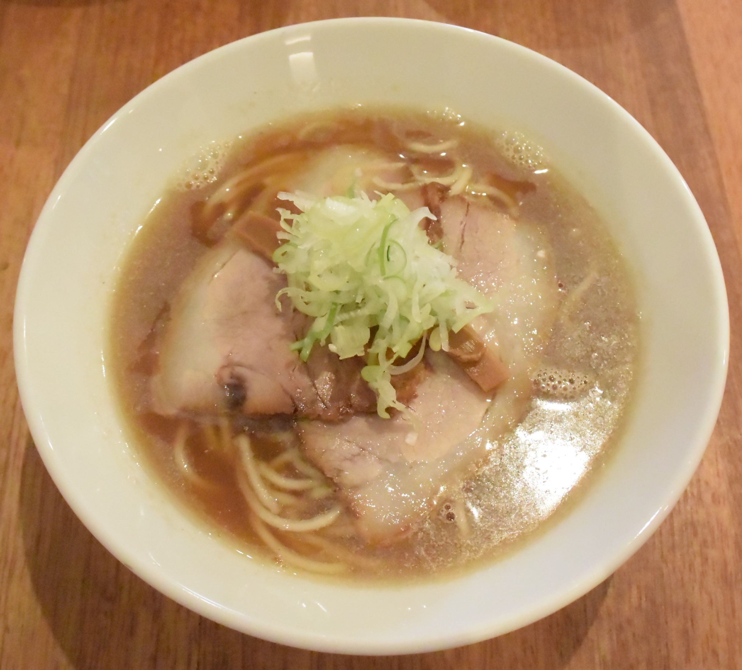 煮干し中華そば・こいくち